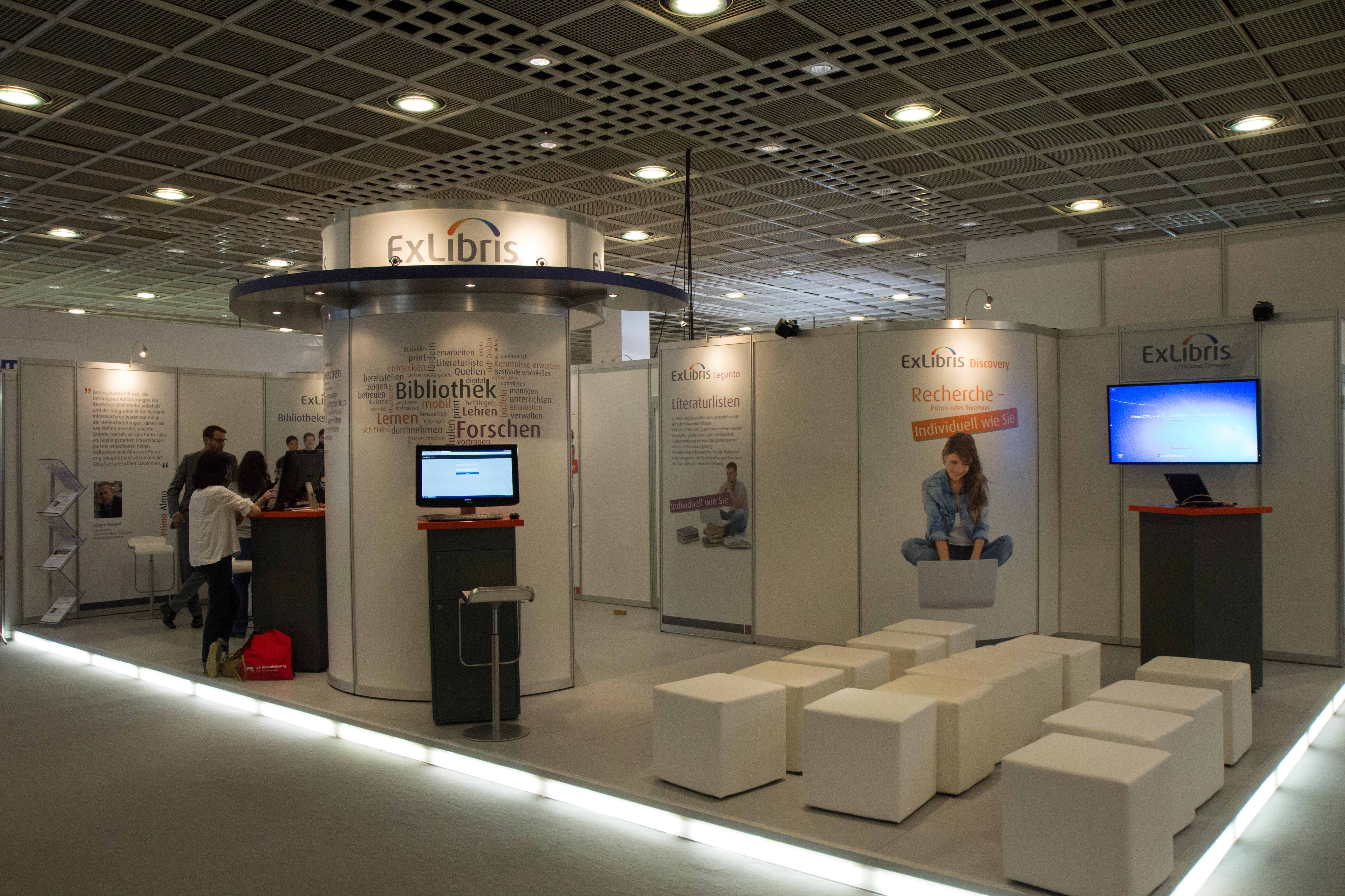 106. Deutscher Bibliothekartag in Frankfurt/Main